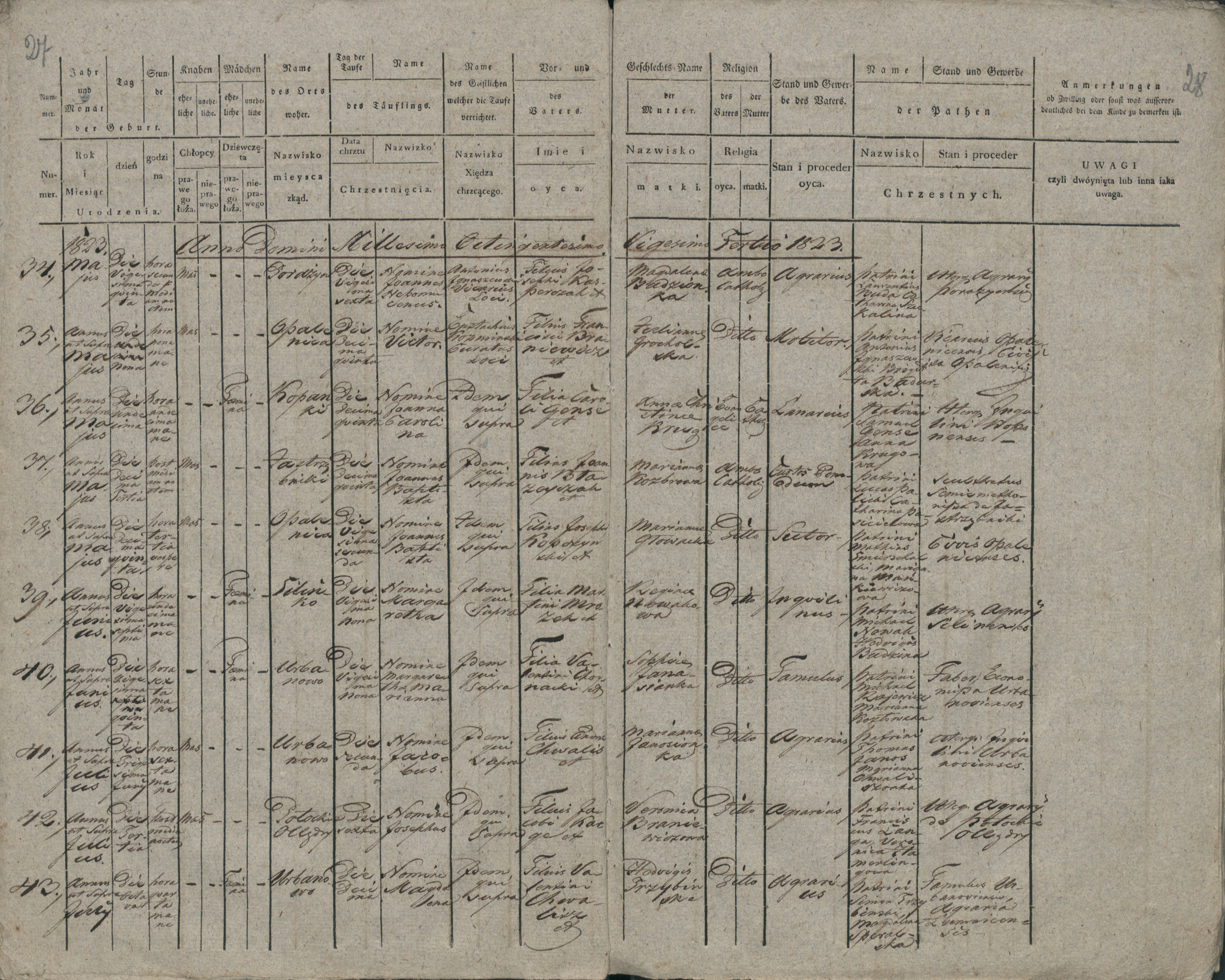 numer 42